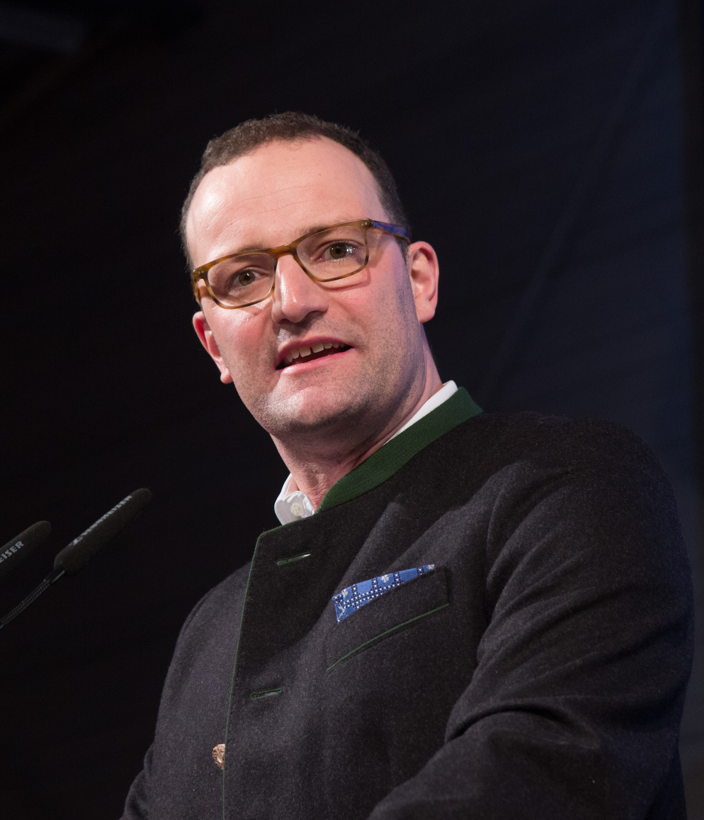 Politischer Aschermittwoch der CDU Thüringen am 14. Februar 2018 in Apolda.